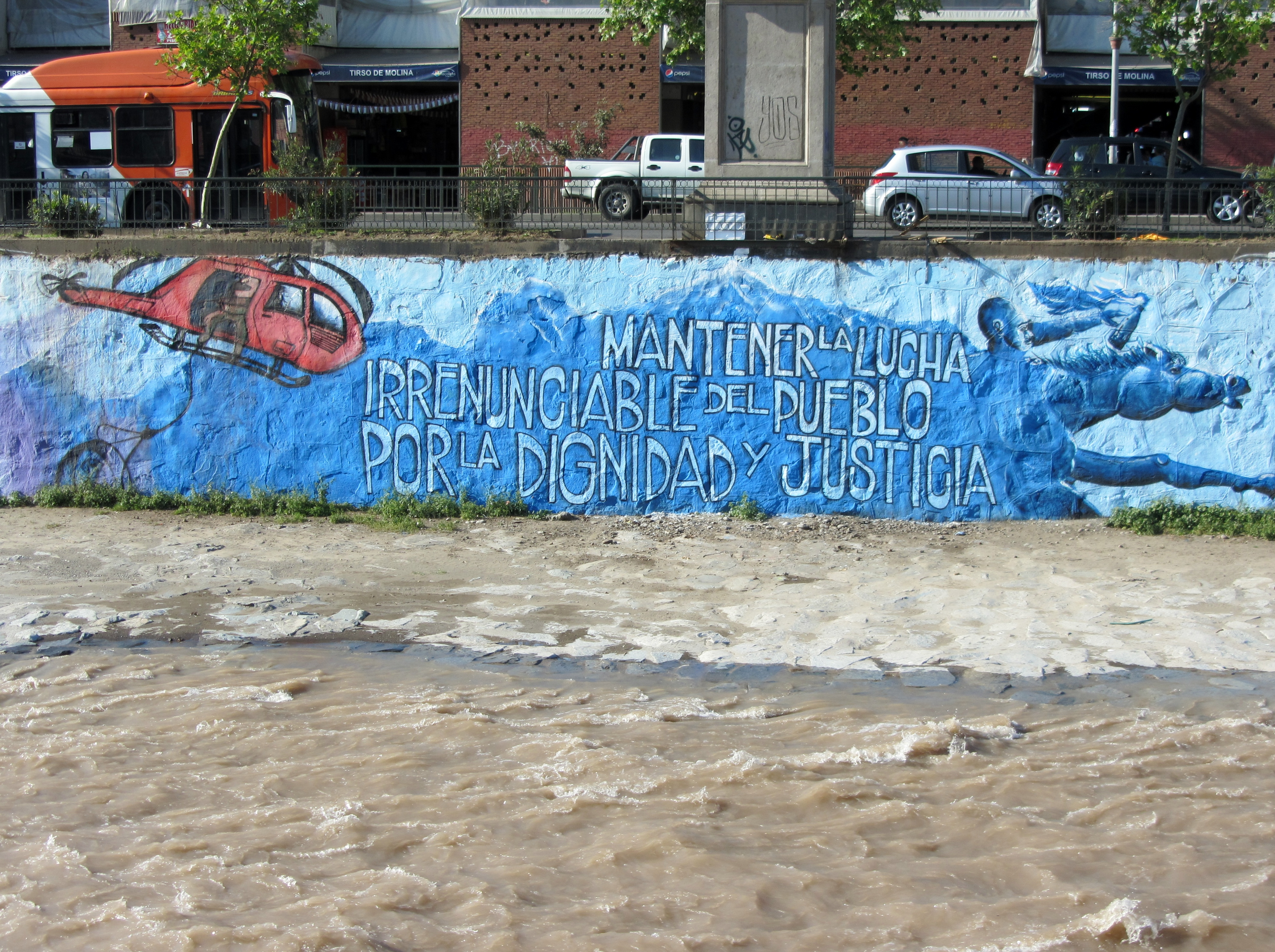 Murales pintados en homenaje al Frente Patriótico Manuel Rodríguez en la ribera norte del río Mapocho, a la altura del mercado de abastos Tirso de Molina, entre el puente de la Paz y el de Los Carros (peatonal).